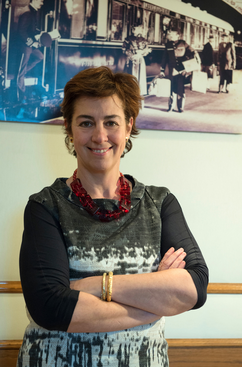 Gioia Ghezzi, Presidente del Gruppo Ferrovie dello Stato Italiane